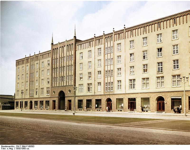 Rostock, Straße des Nationalen Aufbaus Rostock Straße des Nationalen Aufbau [Rostock.- Straße des Nationalen Aufbaus (heute: Lange Straße)]